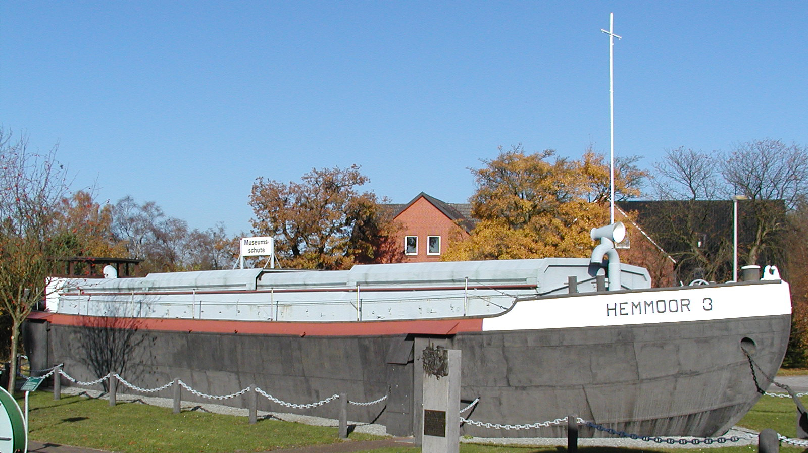 Früher Zementschute, heute Museumsschute "Hemmoor 3"